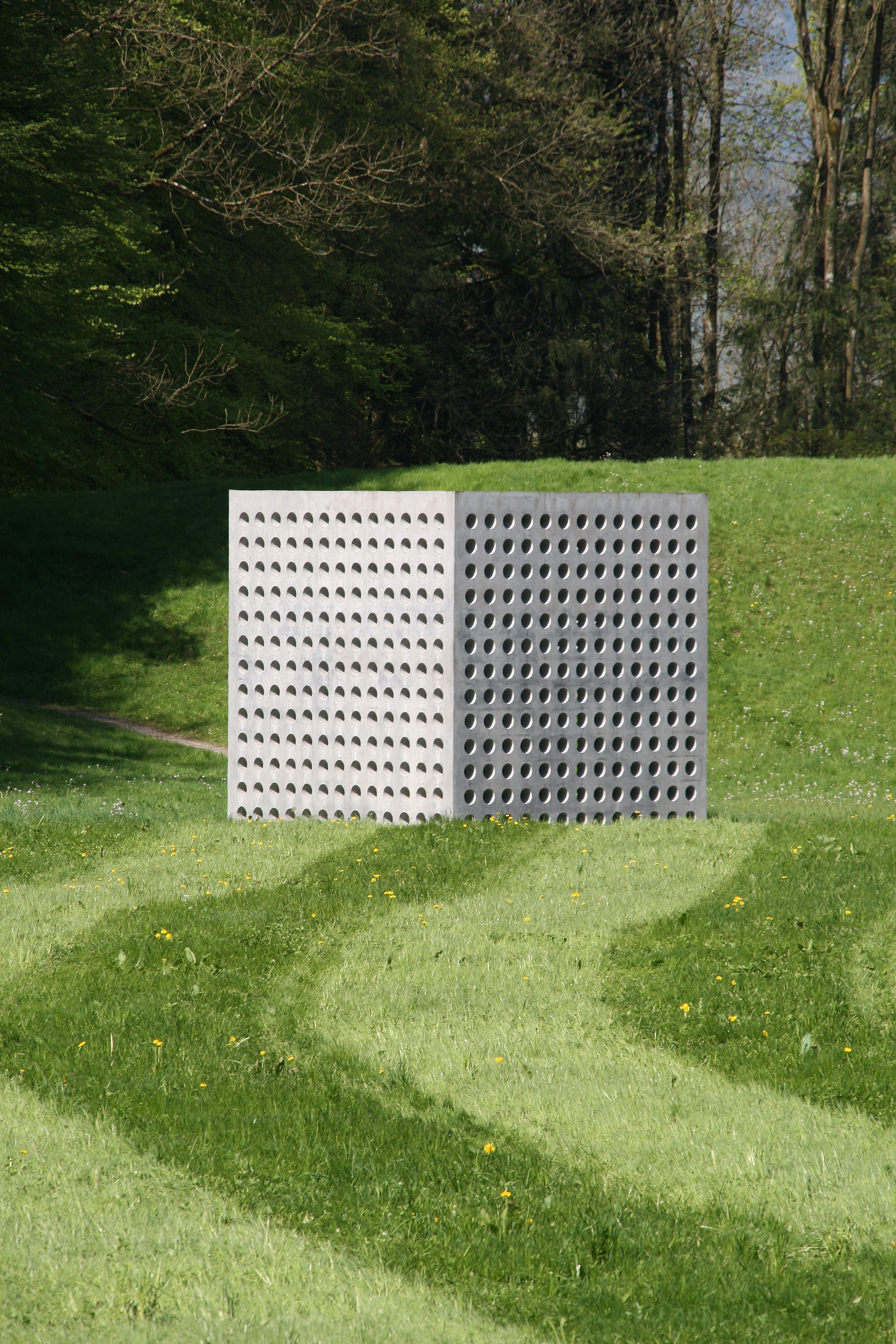 Das Wasserhaus St. Arbogast von Fridolin Welte in Götzis, Vorarlberg; Eine Meditationsstätte , erbaut am 04. Juli 2003